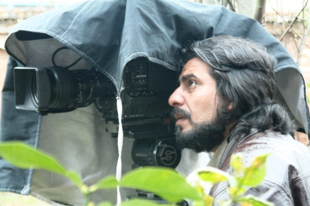 پشت صحنه سریال قاب های خالی